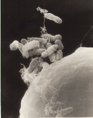 "Agrobacterium tumefaciens [bacteria] al empezar a infectar una célula de zanahoria. En el proceso, el material genético de la bacteria entrará a la célula."